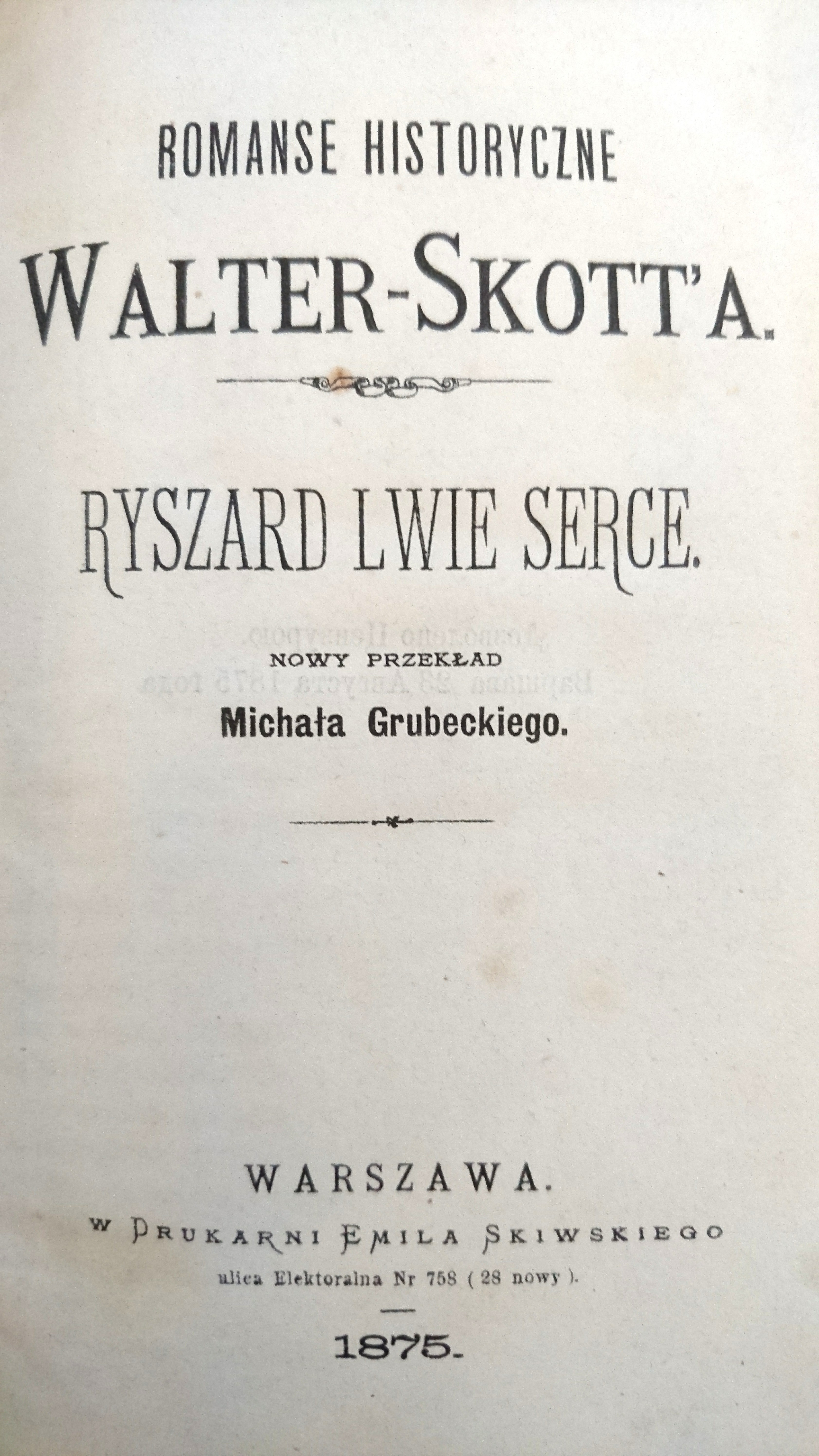 Walter Scott "Ryszard Lwie Serce" wyd. Polskie z roku 1875 w tłumaczeniu Michała Grubeckiego. Wydane w drukarni Emila Skiwskiego ul. Elektoralna 758.